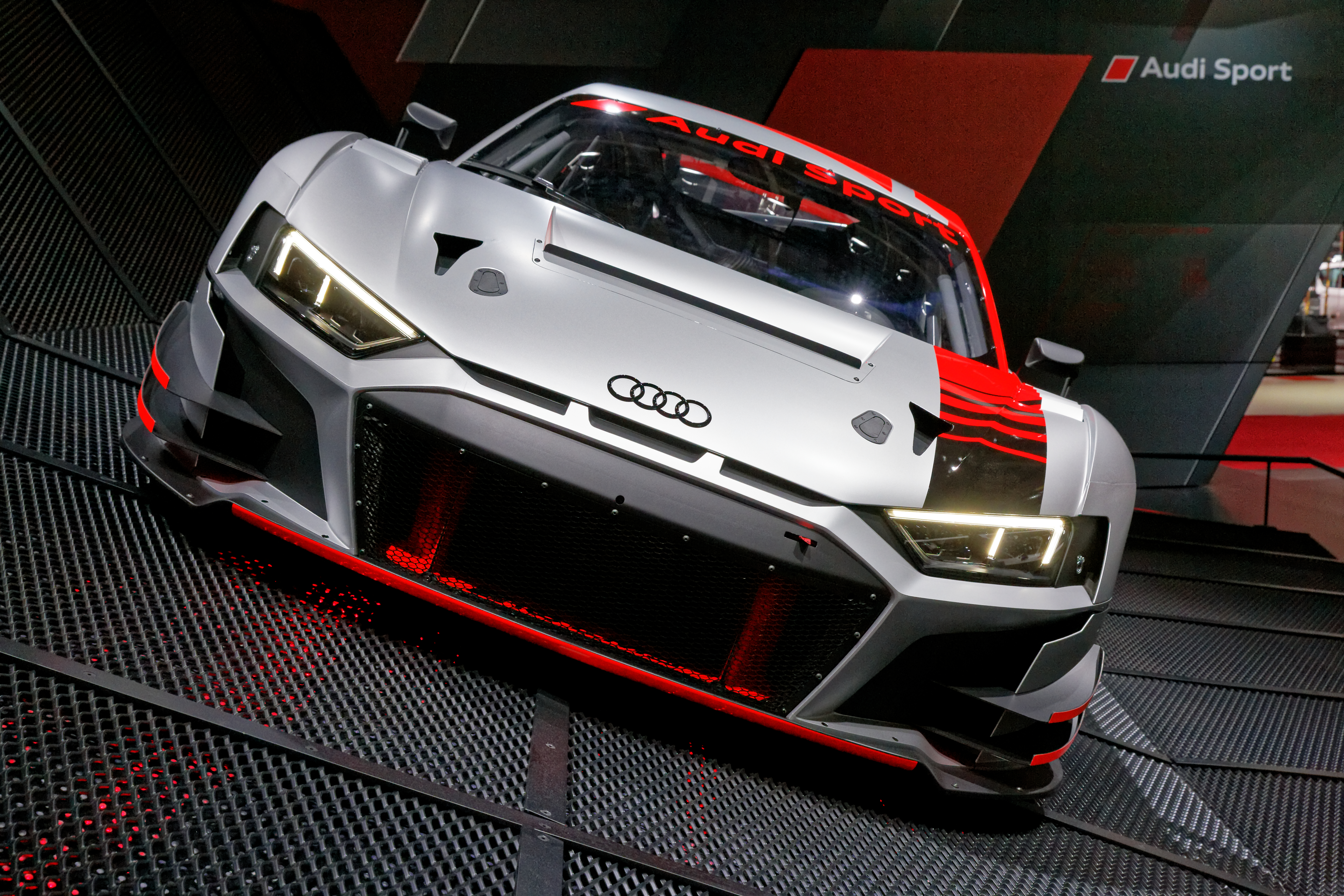 Une Audi R8 LMS GT3 présentée lors du mondial de l'automobile de Paris 2018.